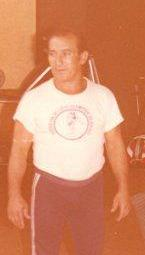 lorenzo allenatore lotta